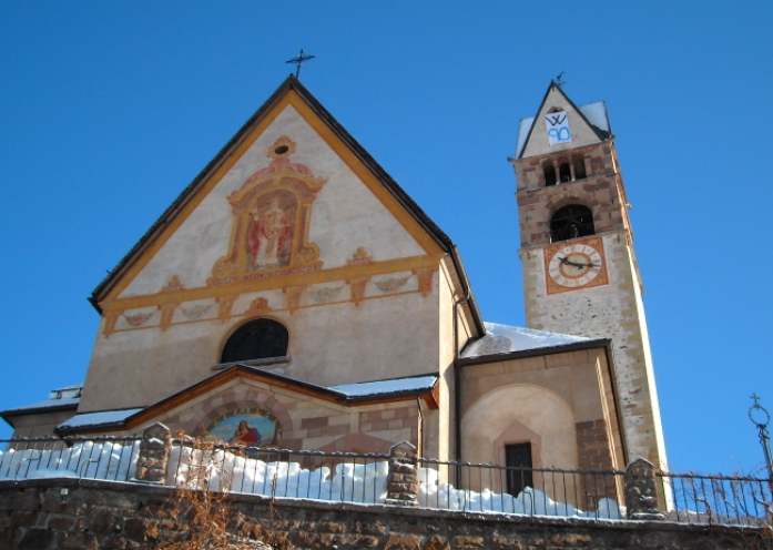 La chiesa di San Nicolò - Carano -TN